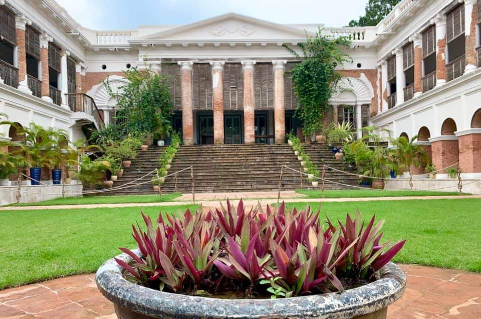 Bawali Rajbari